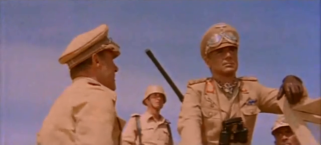 La battaglia di El Alamein di Giorgio Ferroni (1969)